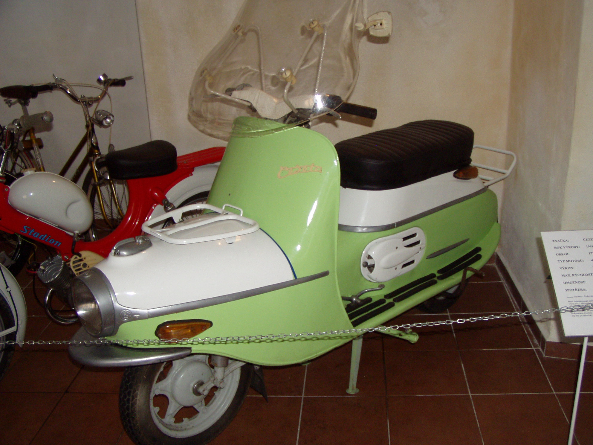 ČZ 250 typ 471 (1975)